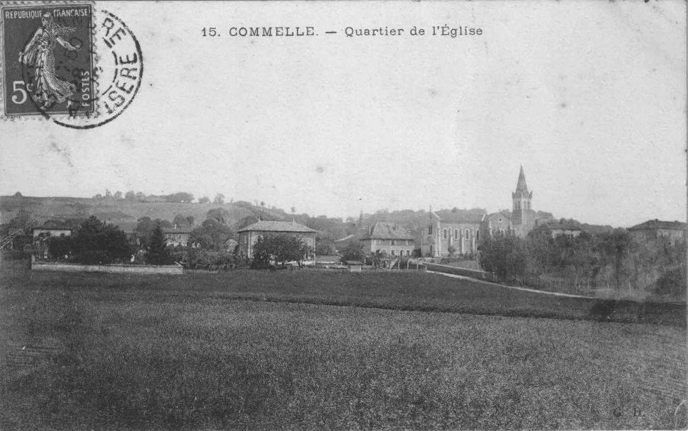 Commelle (Isère) - quartier de l'église.